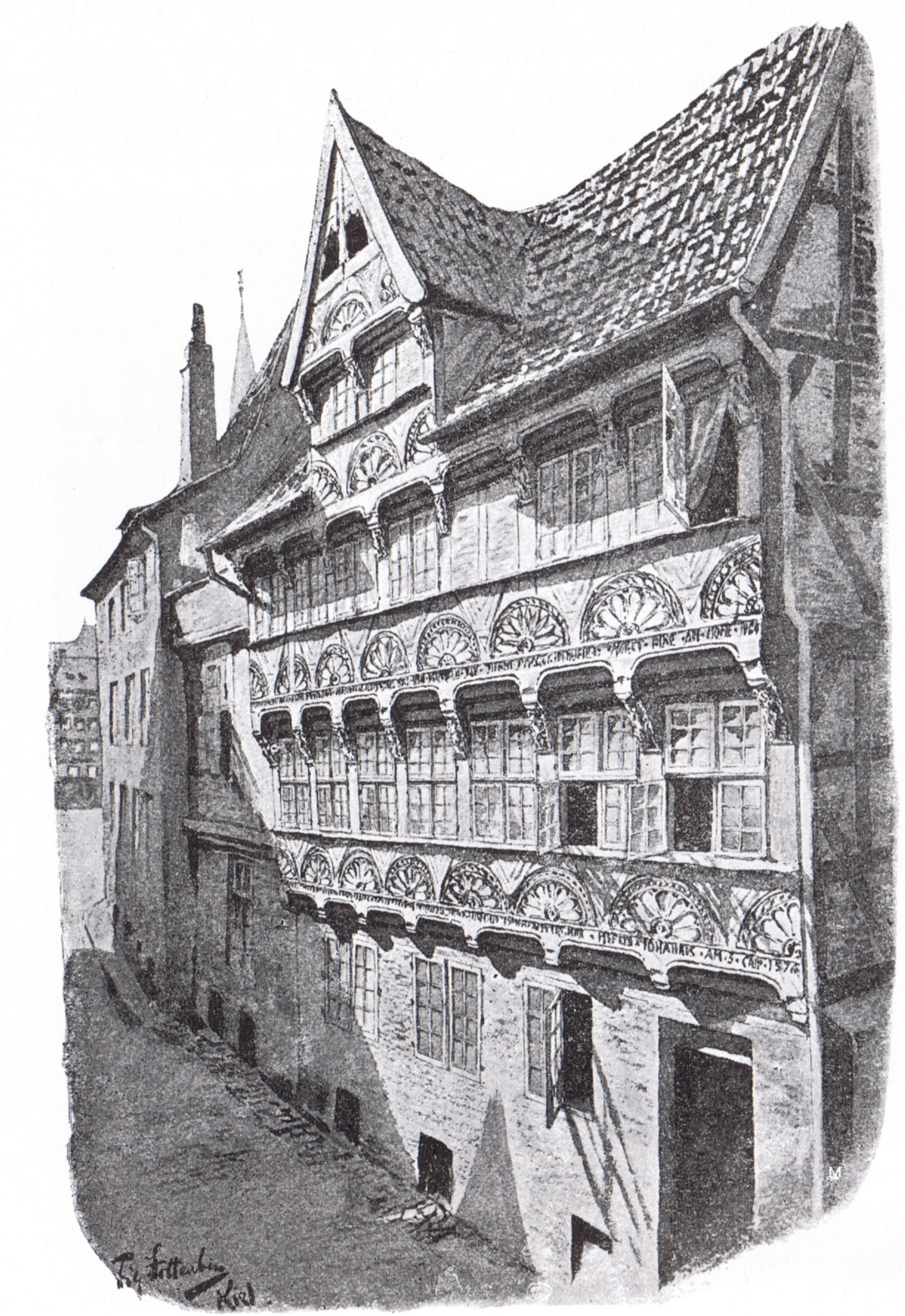 Das alte Haus in der Haßstraße in Kiel, Zeichnung von Fritz Stoltenberg.